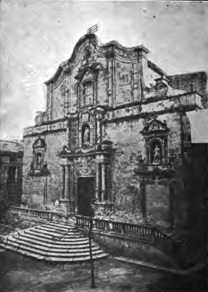 Alcoy: Iglesia de Santa María